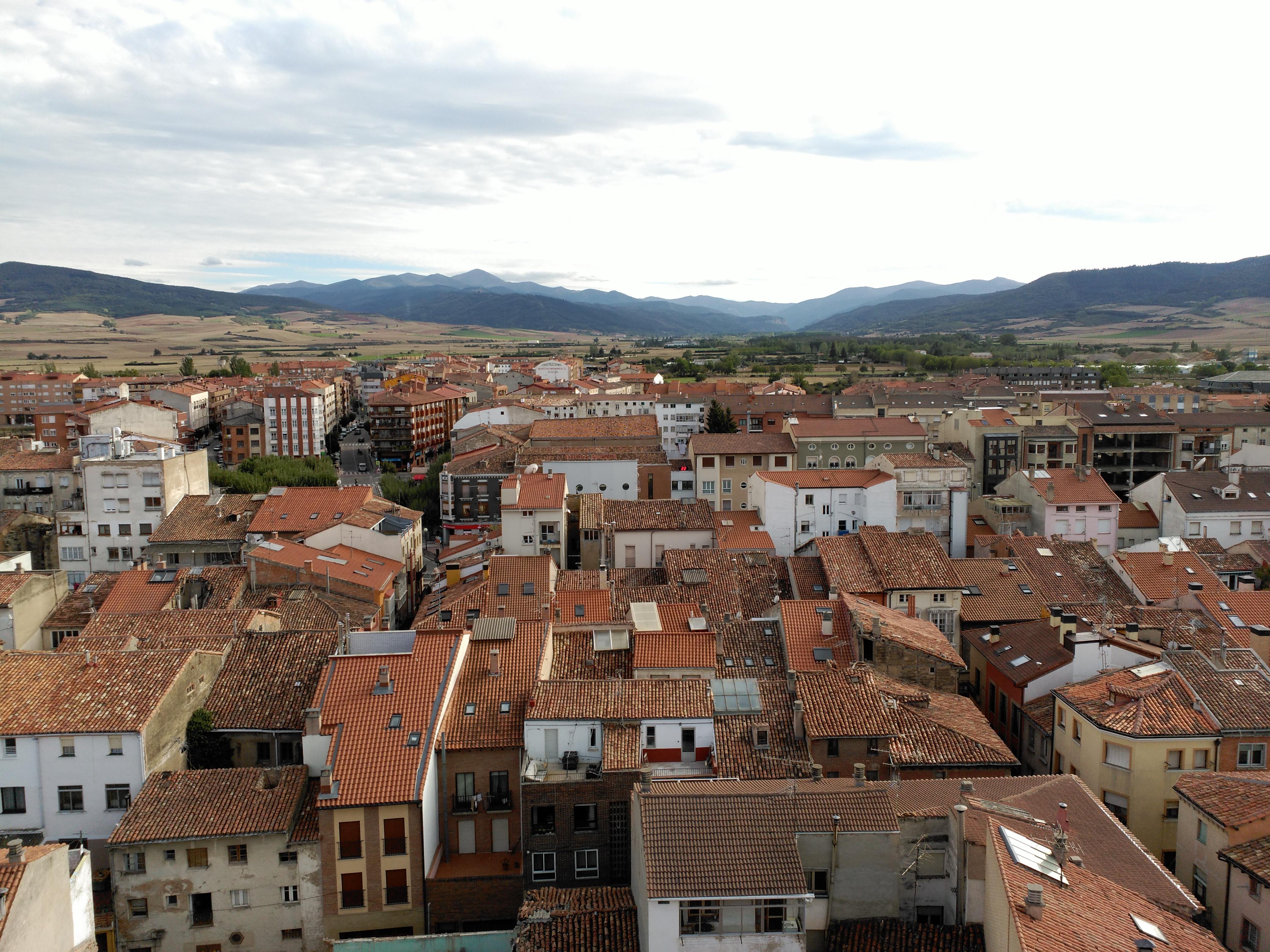 Sierra de la Demanda y pico San Lorenzo (izquierda) visto desde Santo Domingo de la Calzada